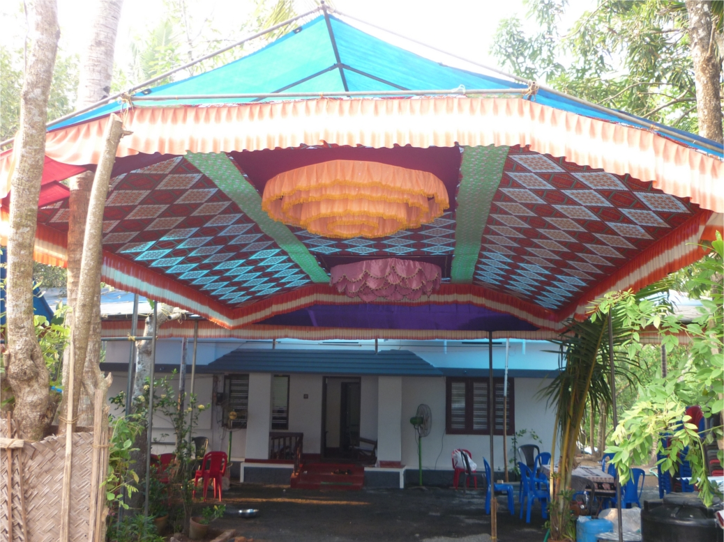 പന്തലിന്റെ ചിത്രം